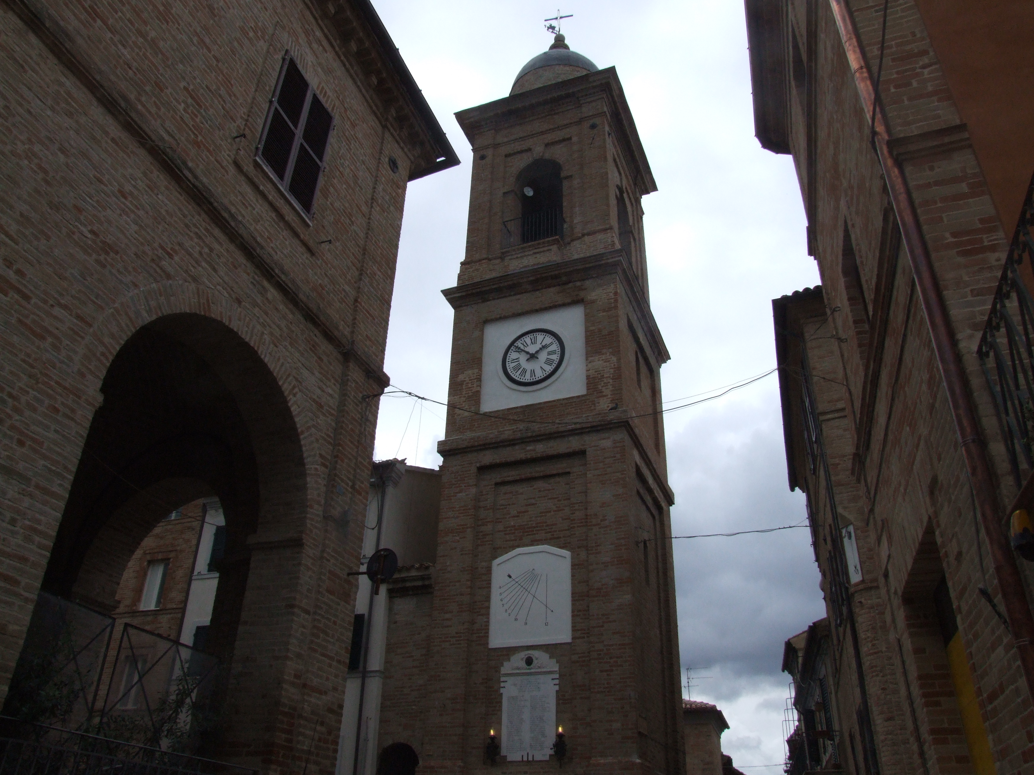 Torre Civica di Urbisaglia This is a photo of a monument which is part of cultural heritage of Italy.